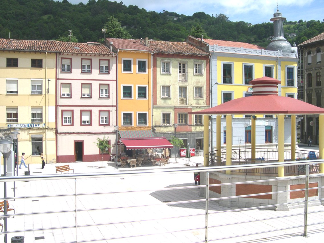 Plaza Sotrondio Smra Asturies